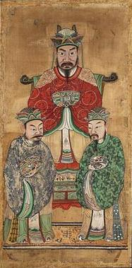 서울 마포구 신수동 복개당에 봉안되었던 세조 영정